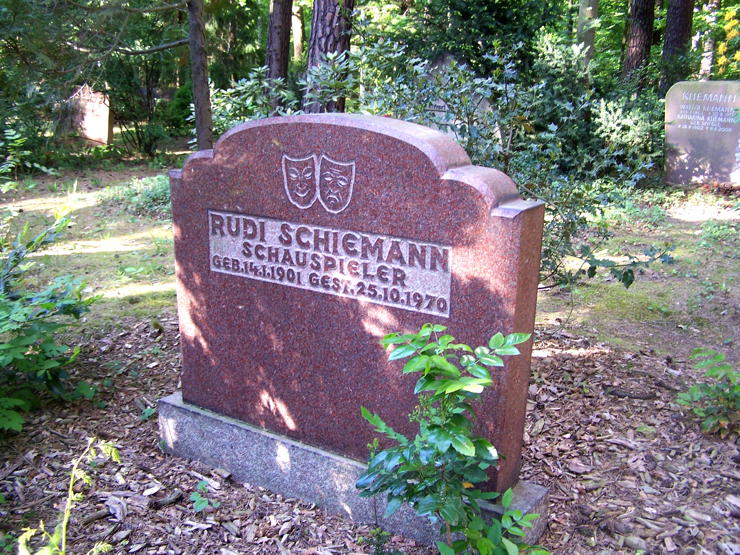 Grab des Schauspielers Rudi Schiemann auf dem Heidefriedhof in Dresden